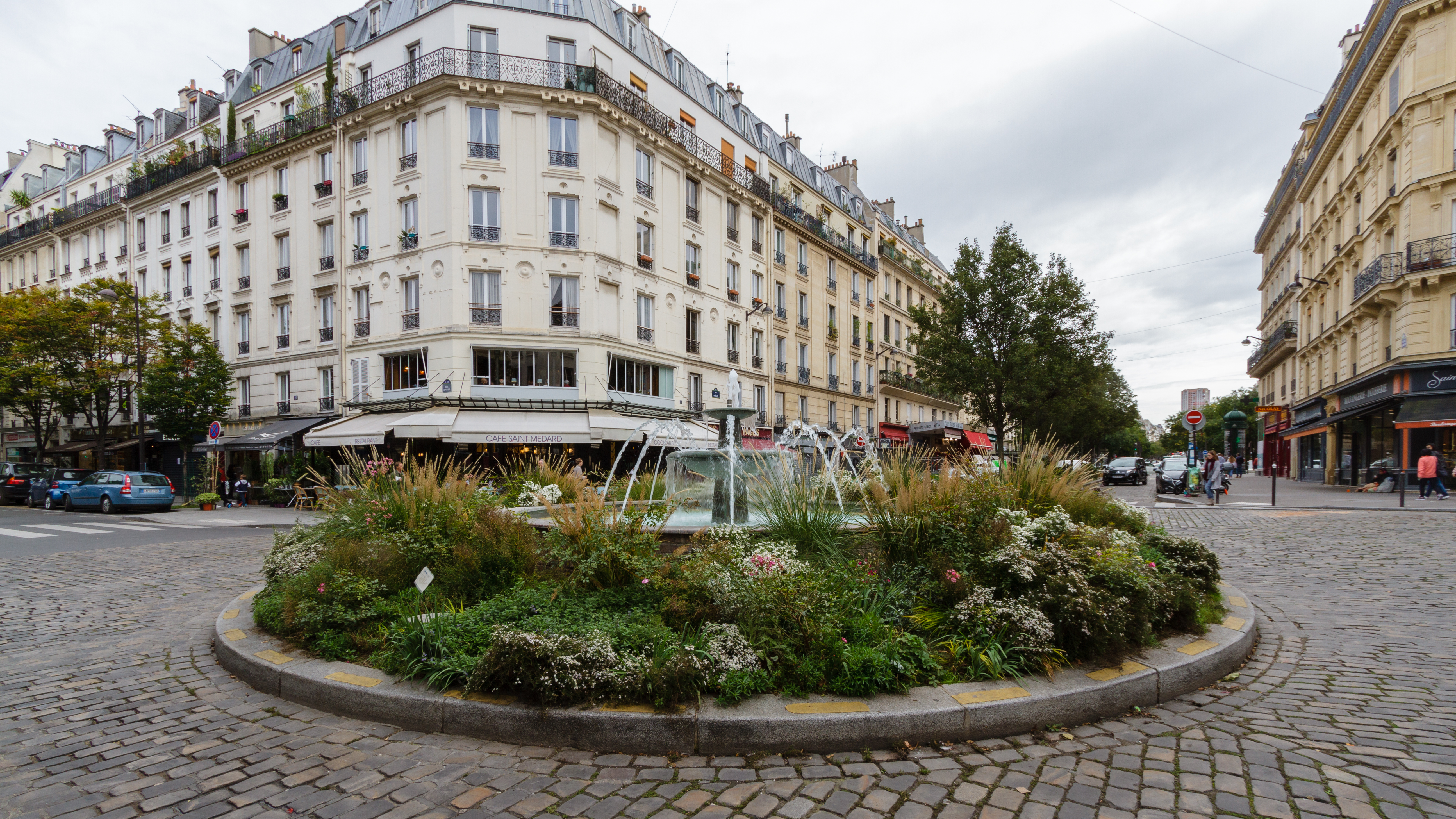 Paris